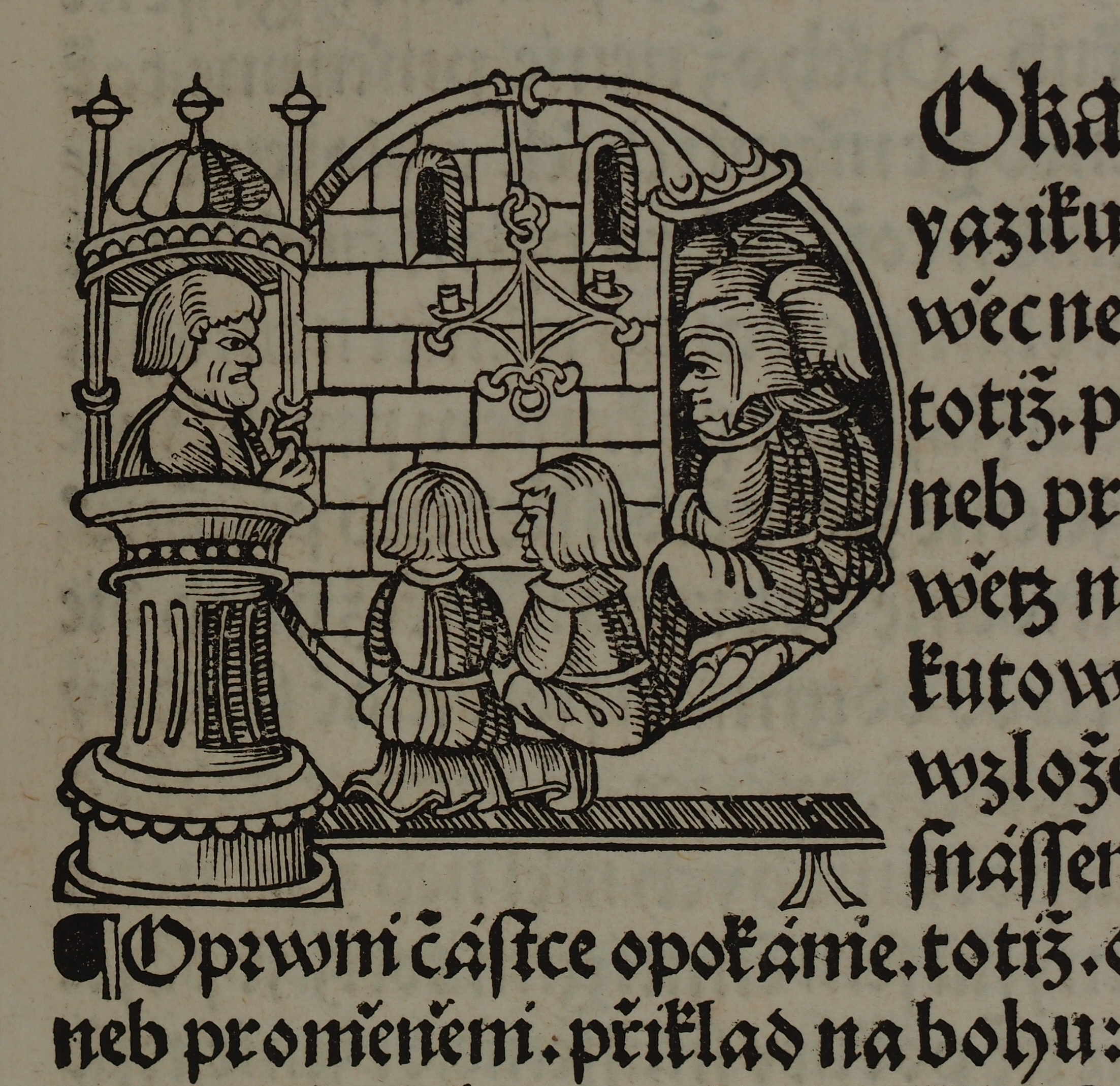 Lukáš Pražský